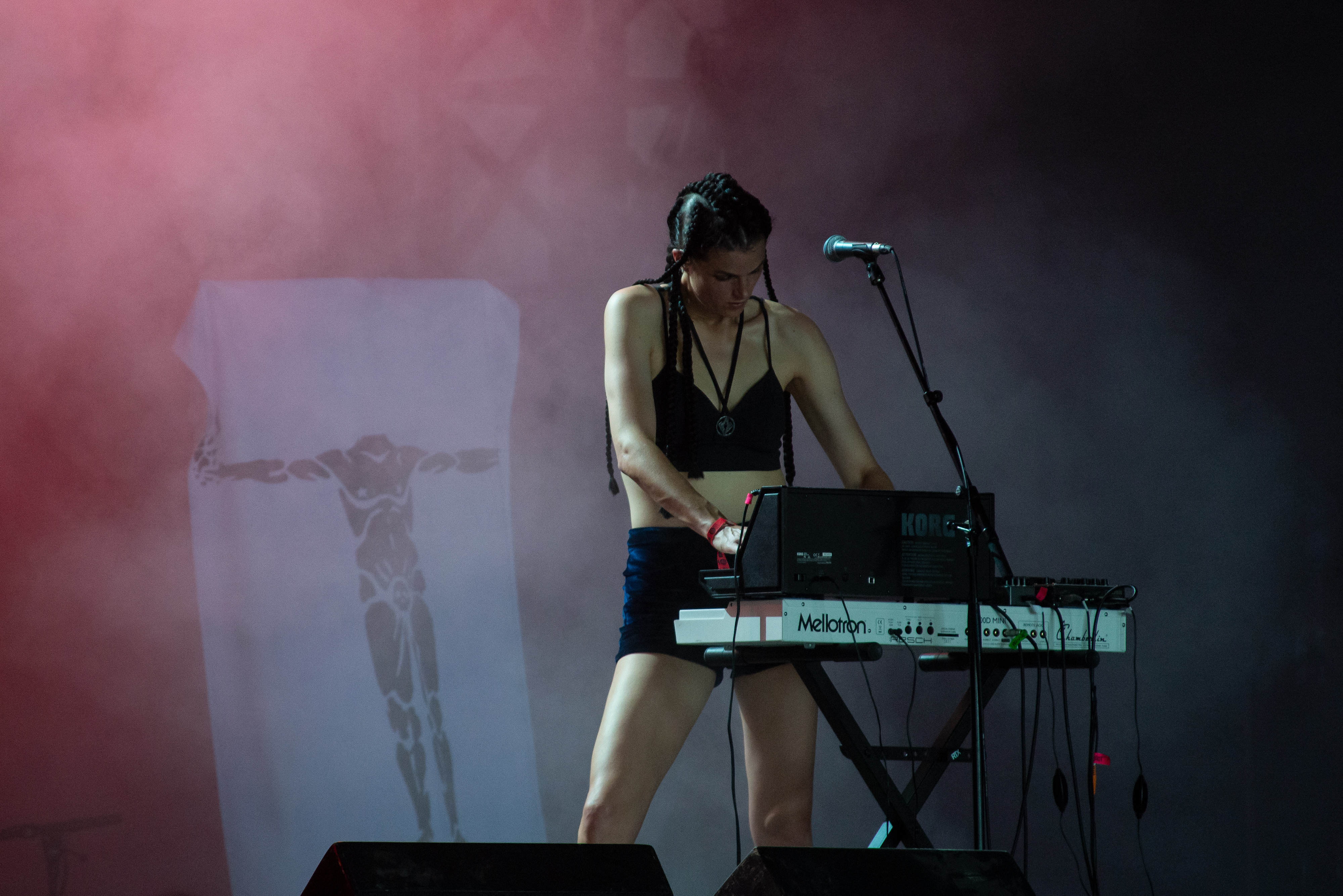 Karin Park, claviériste du groupe Årabrot au Hellfest 2019.